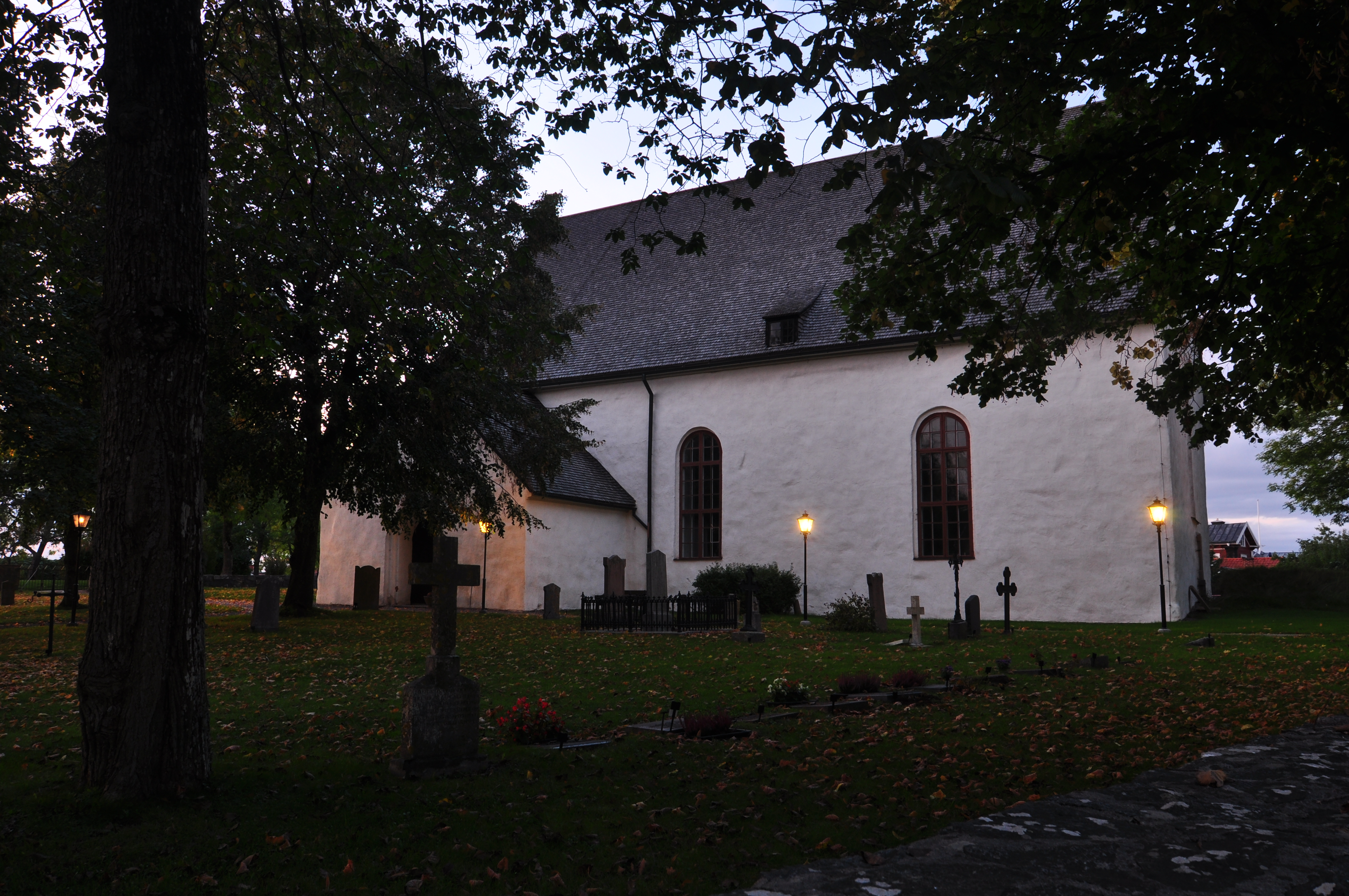 Öregrunds kyrka från sydost.